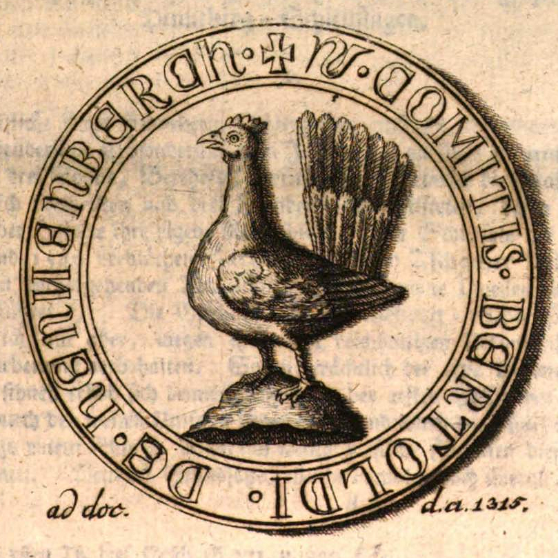 Zeichnung des Siegels des Grafen Berthold VII. von Henneberg-Schleusingen im Jahre 1315